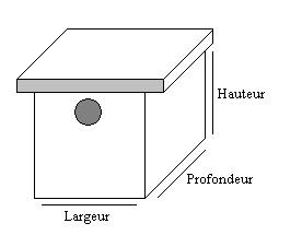 Plan d'un nichoir fermé Auteur : C Watier Date : Juillet 2006